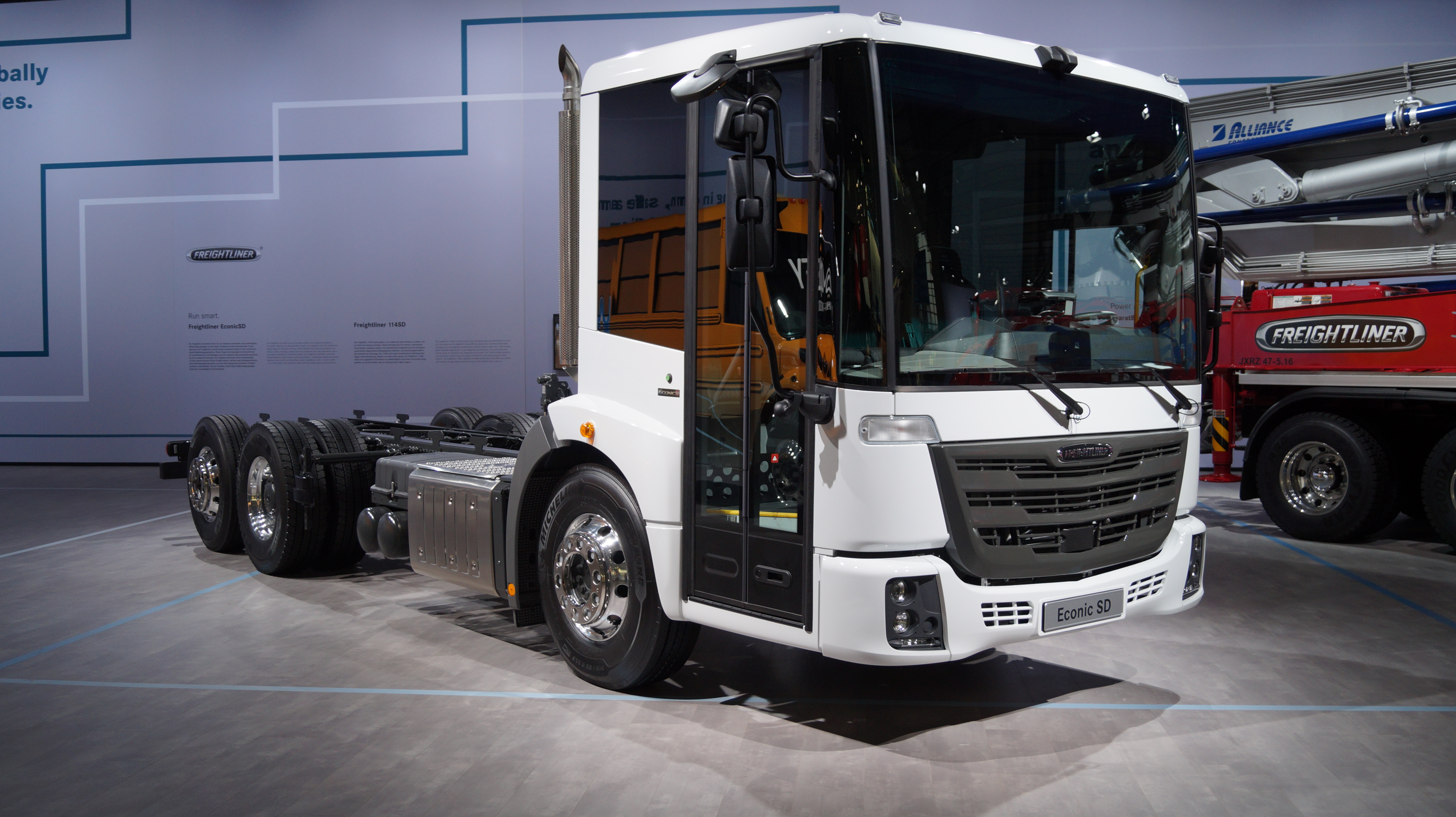 Schrägansicht der Front eines Freightliner EconicSD, ausgestellt auf der IAA 2018.